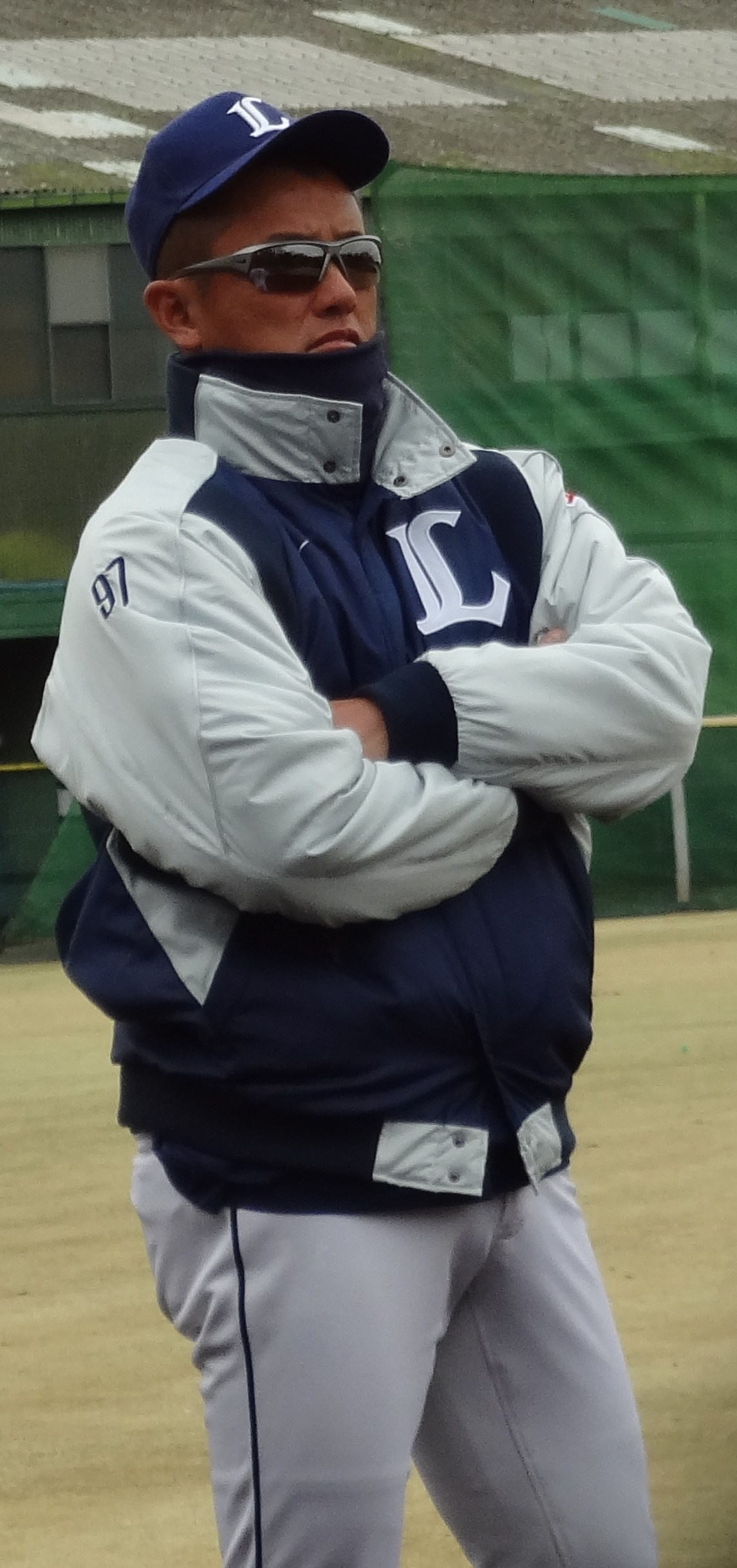 西武第二球場